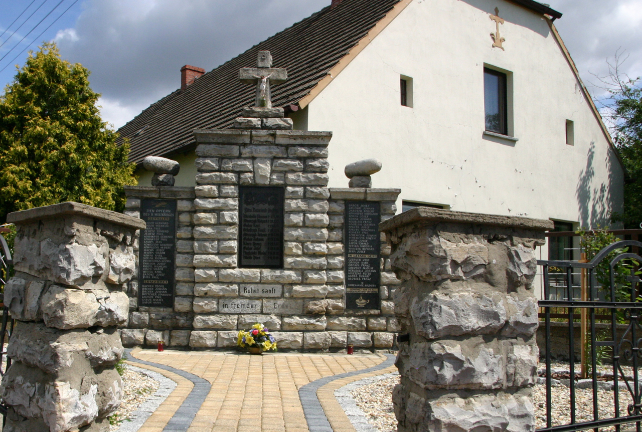 Odrowąż (dodatkowa nazwa w j. niem. Oderwanz, 1936-45 Oderhöh) – wieś w Polsce położona w województwie opolskim, w powiecie krapkowickim, w gminie Gogolin.